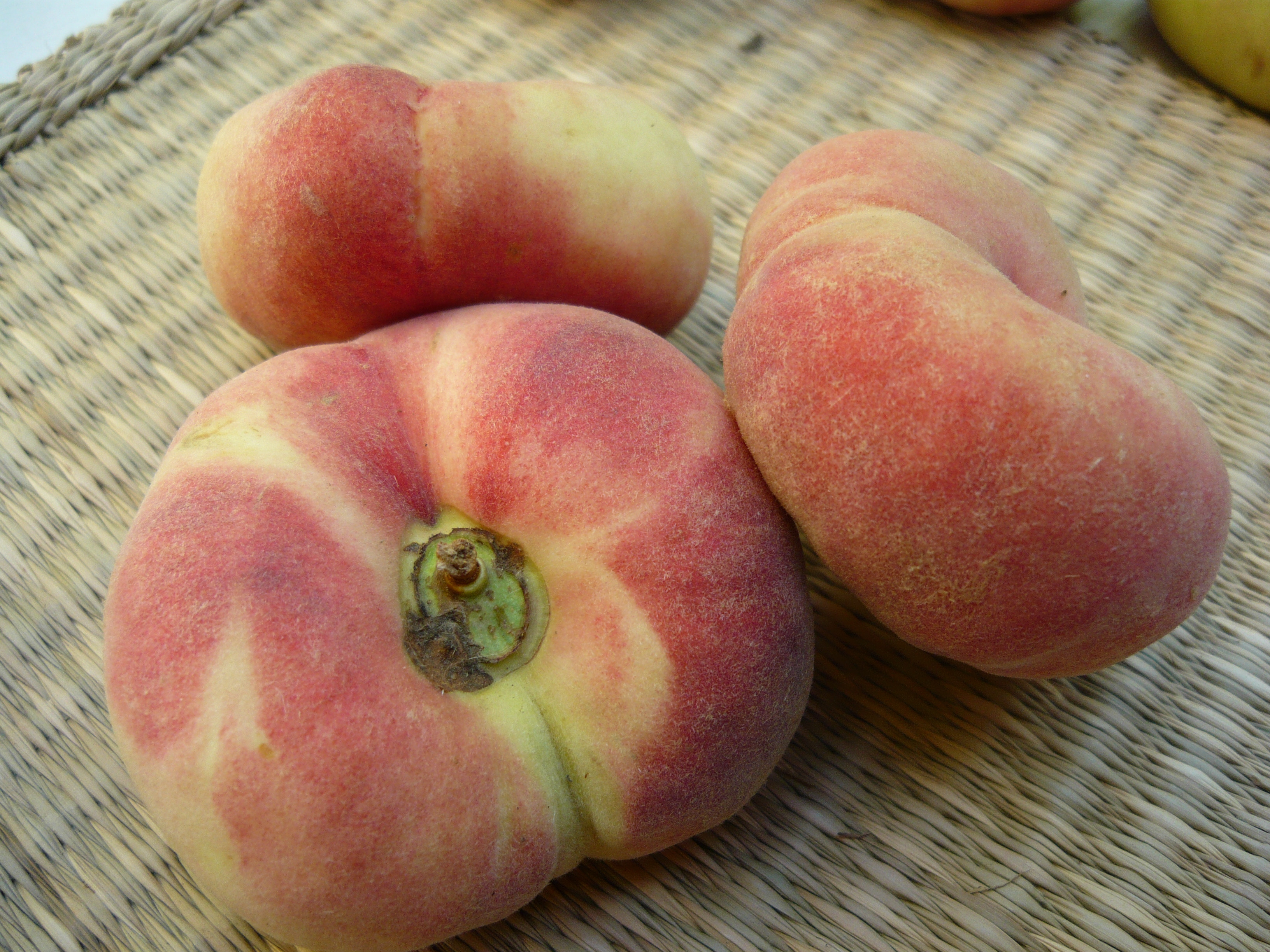 Paraguayas, Prunus persica var. compressa, fruta comercial, Madrid, España.